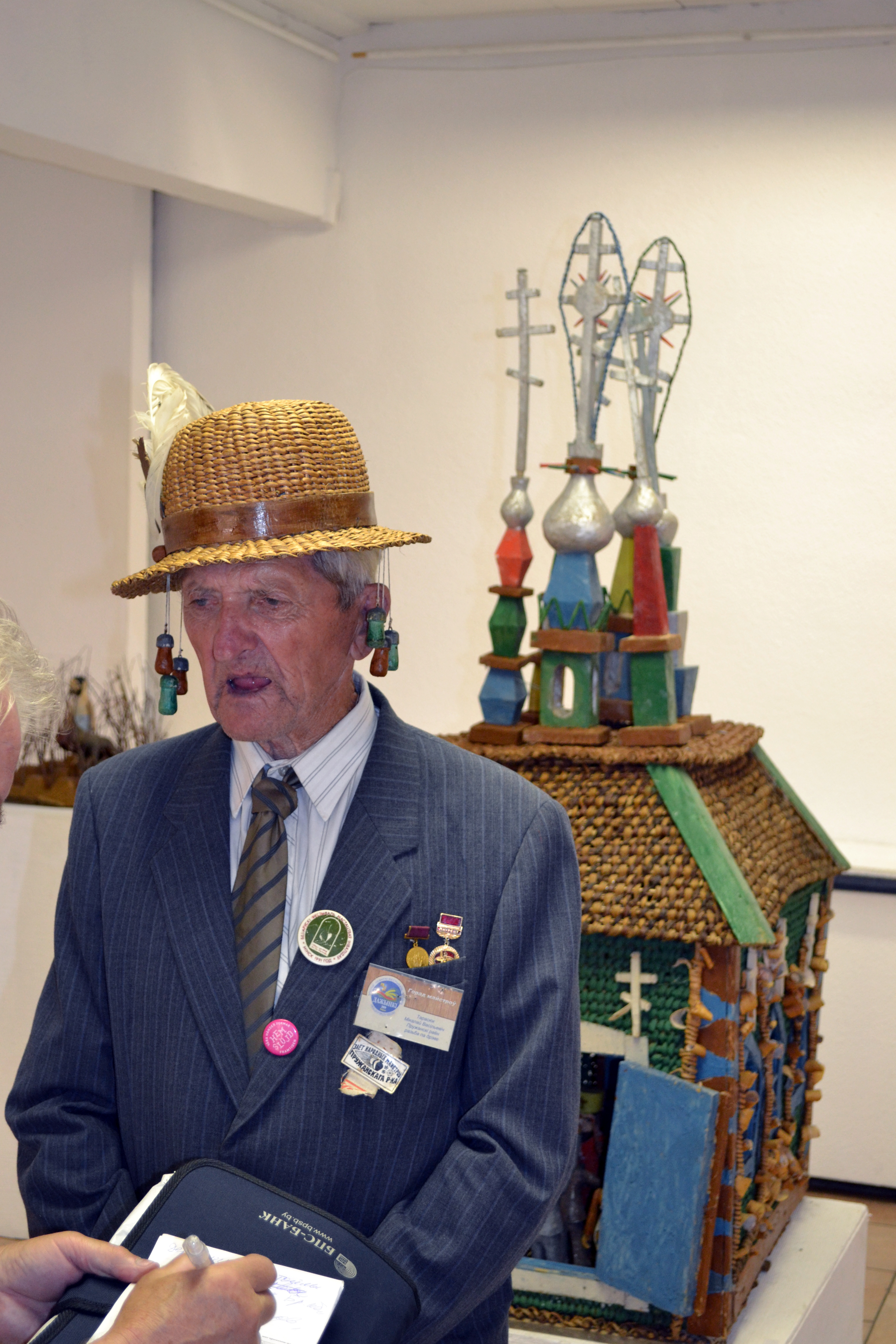 Беларуская (тарашкевіца): Мікалай Тарасюк на адкрыцьці ўласнай выставы «Страчаны рай» у Музэі сучаснага выяўленчага мастацтва